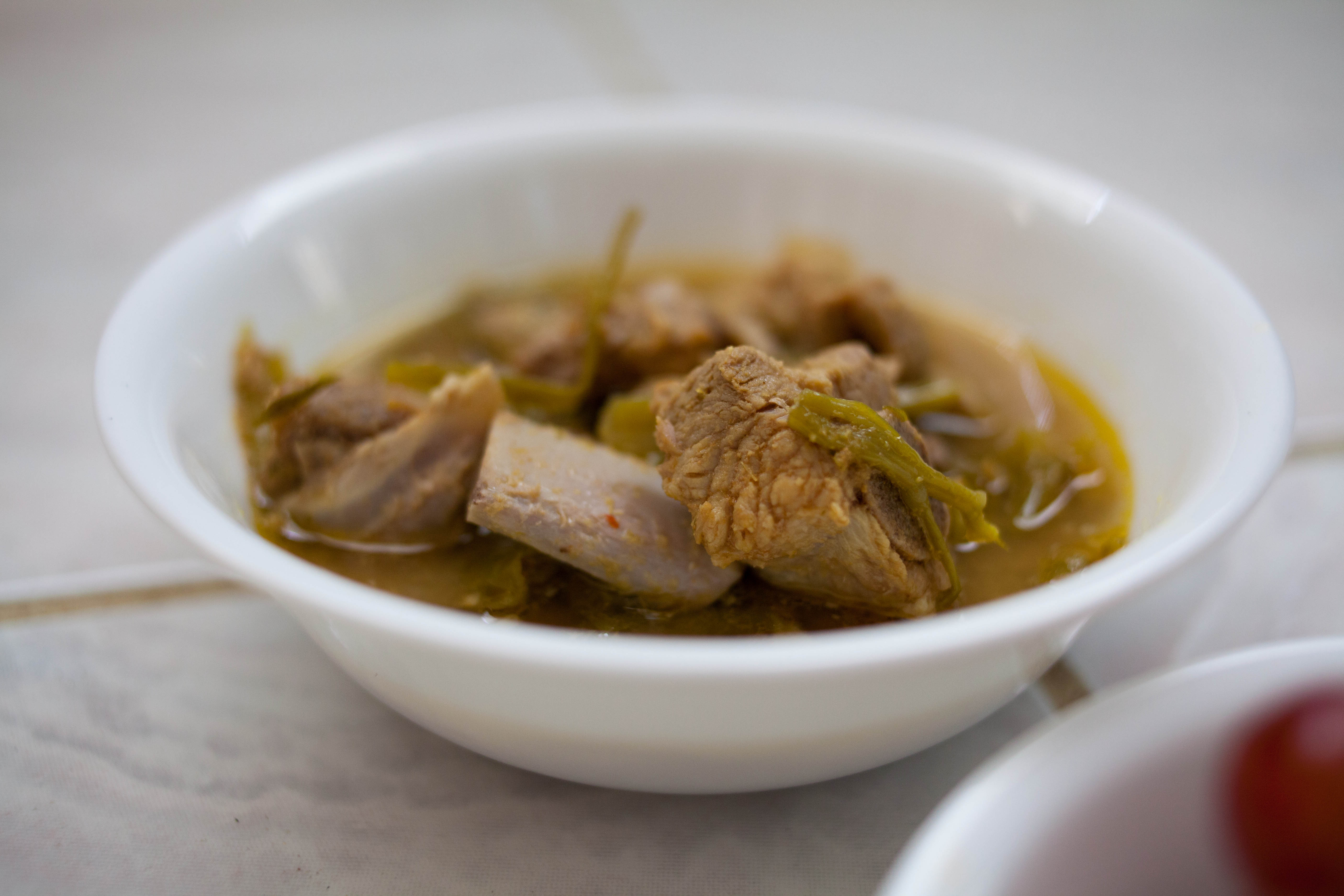 Samlar Machu